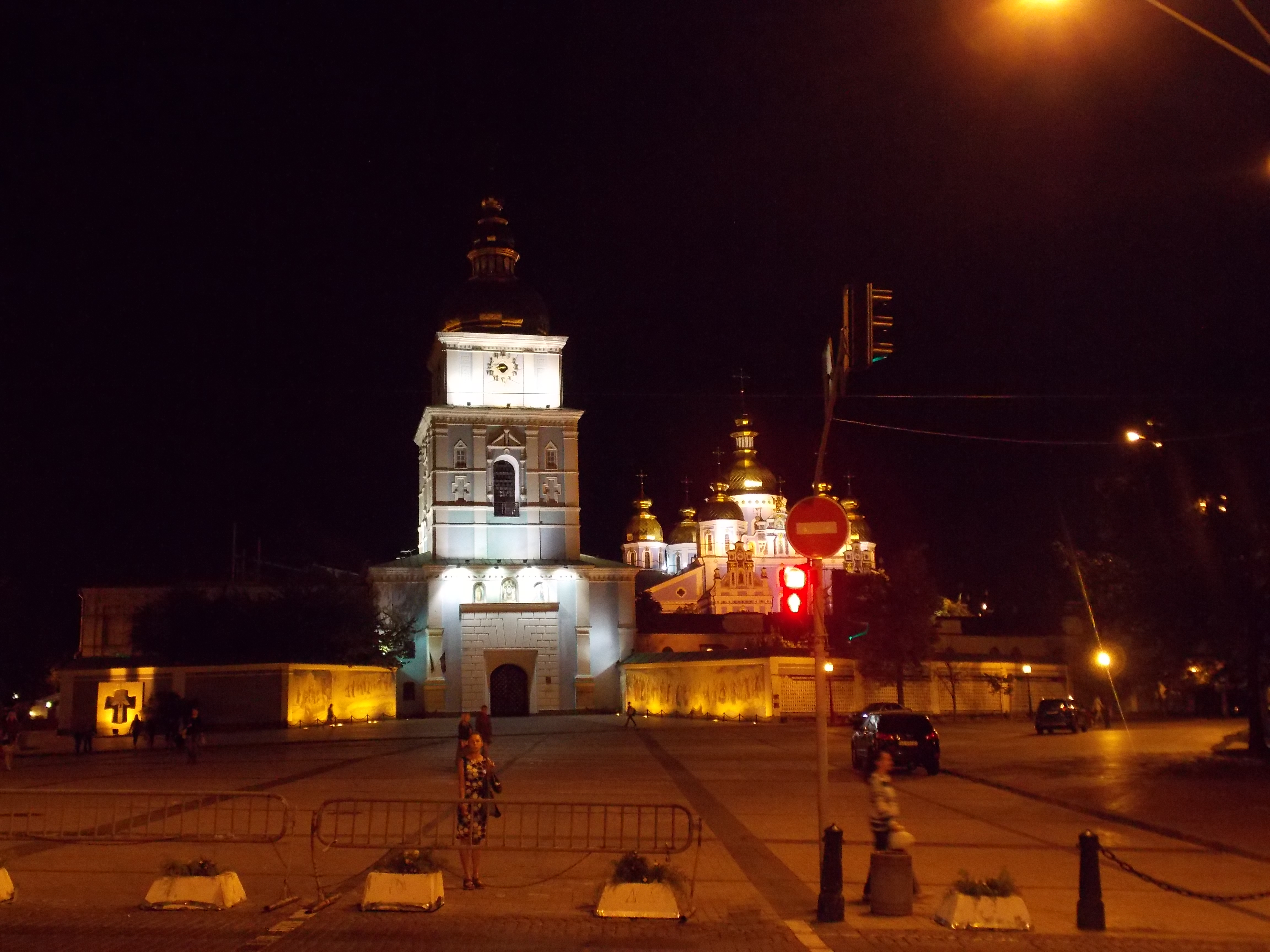 Комплекс Михайлівського Золотоверхого монастиря, Київ, Трьохсвятительська вул., 6